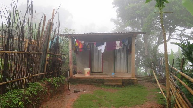 Talimoro